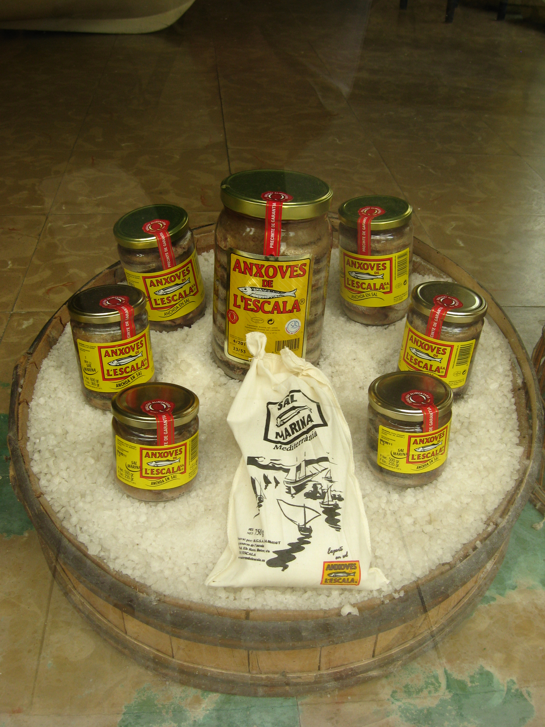 Anchovis von L’Escala Datum: 14.09.2010 Urheber: Michael Pfeiffer alias Benutzer:Gordito1869 Quelle: privates Fotoalbum des Urhebers